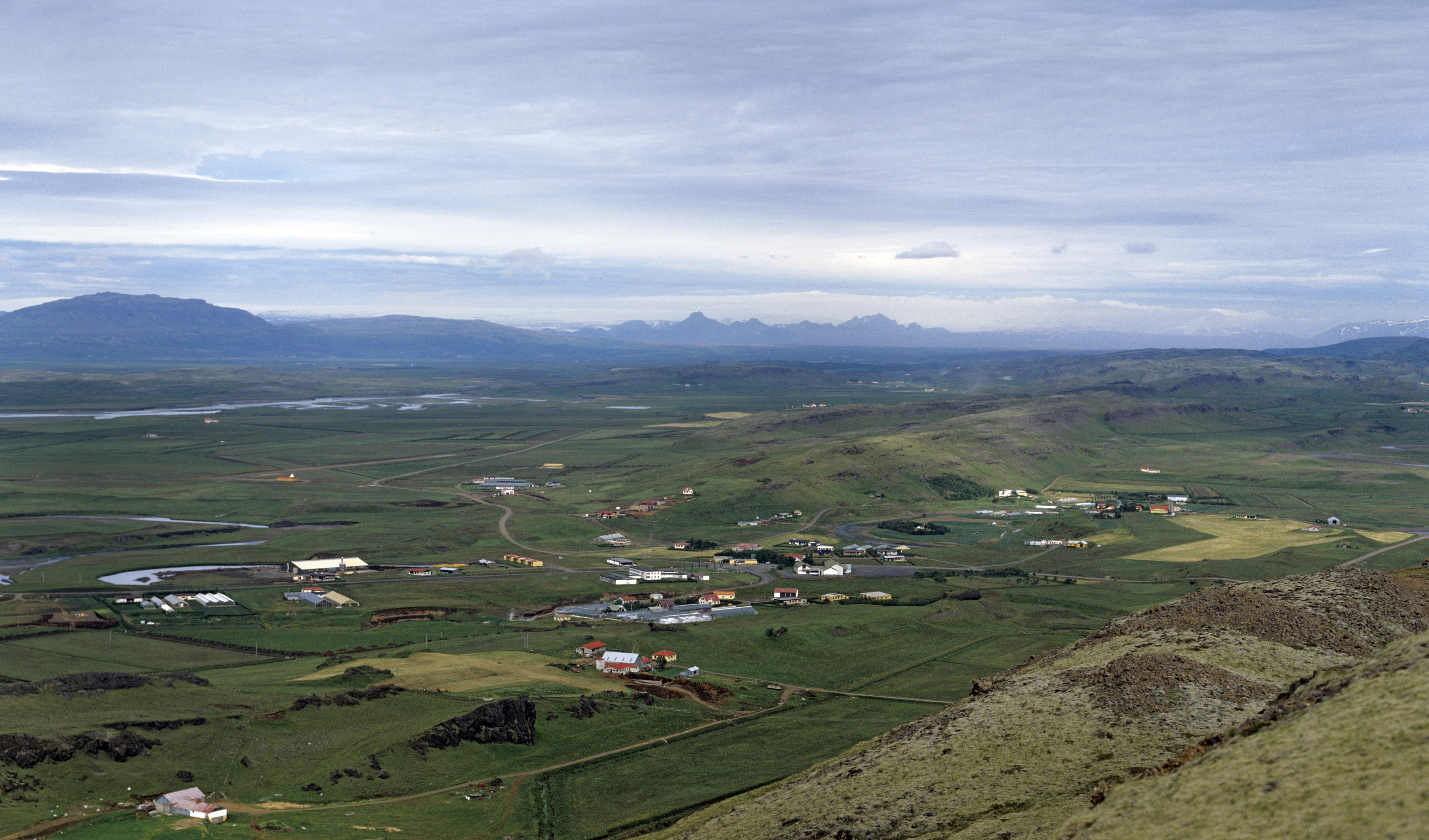 Deitsch: Flúðir; Sicht vom Miðfell nach Norden.